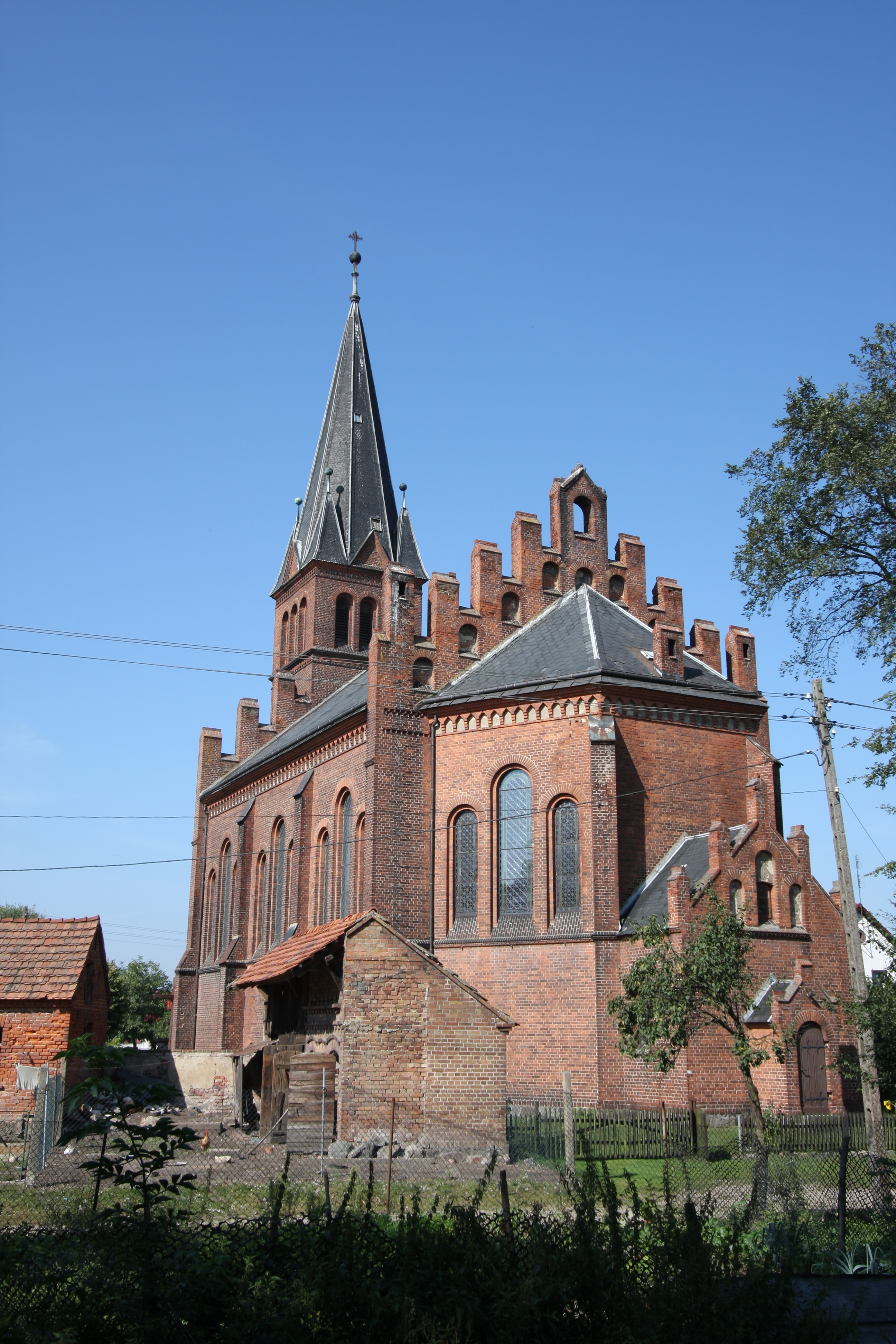 Kręcko, kościół ewangelicki, ob. rzym.-kat. fil. p.w. Przemienienia Pańskiego, mur., 1880, 1922-1926